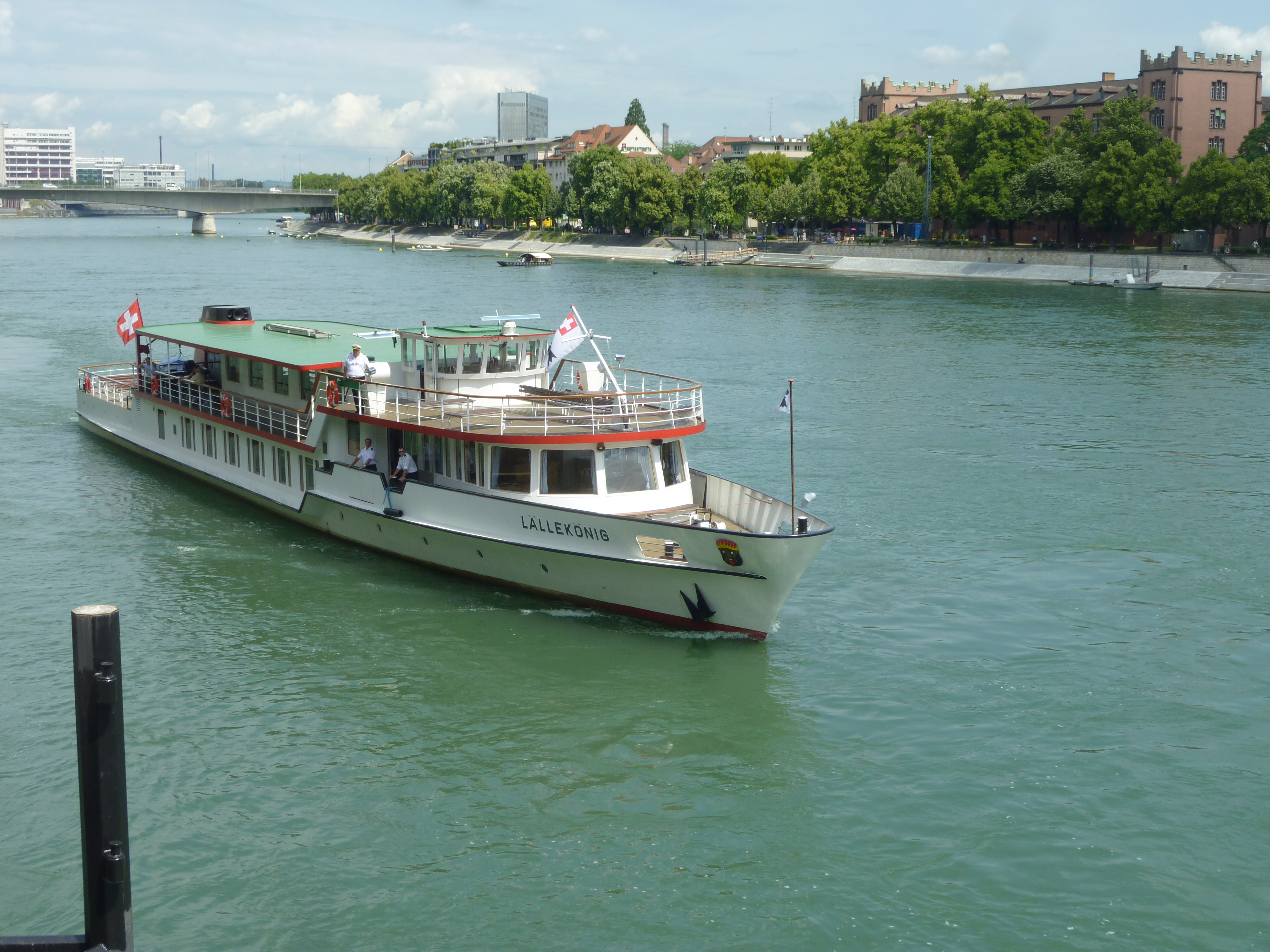 Rheinschiff Lällenkönig in Basel